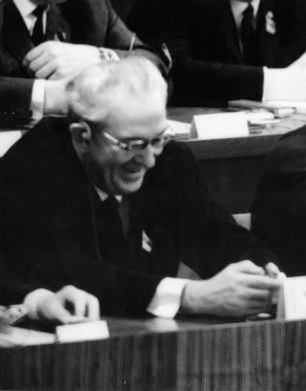 Title: Berlin, VII. SED-Parteitag, 1.Tag Factual corrections and alternative descriptions are encouraged separately from the original description. Additionally errors can be reported at this page to inform the Bundesarchiv. Original historic description: Zentralbild Gahlbeck 17.4.1967 Th-Qu VII. Parteitag der SED - 17.4.1967. Blick ins Präsidium während der Eröffnungssitzung in der Berliner Werner-Seelenbinder-Halle. Der Generalsekretär des ZK der KPdSU, Leonid Breshnew (rechts), im Gespräch mit dem Mitglied des Politbüros des ZK der SED Erich Honecker, links: Juri Andropow, Sekretär des ZK der KPdSU.